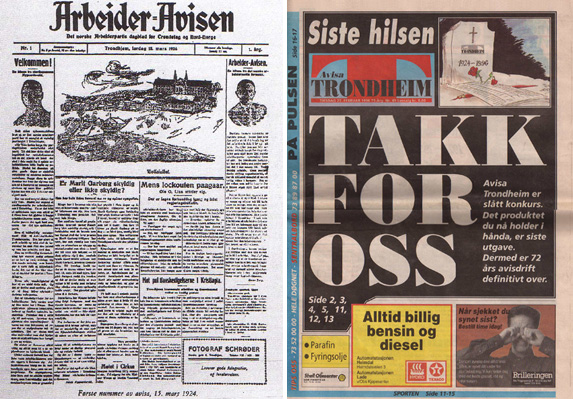 Arbeider-Avisas første og siste utgave.